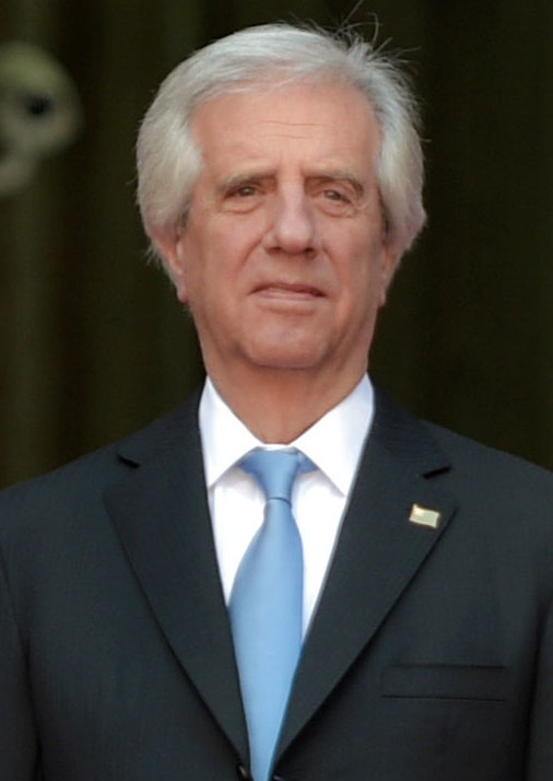 El Presidente Enrique Peña Nieto dio la bienvenida al Presidente de la República de Uruguay, Tabaré Vázquez, quien se encuentra en Visita Oficial en México.